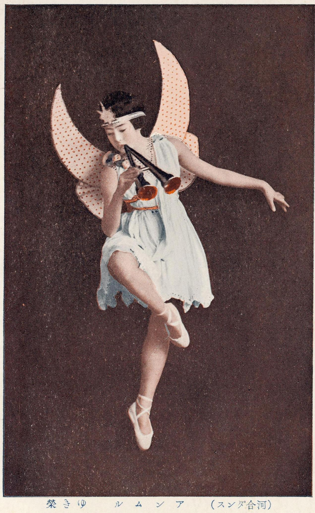 河合ダンス アンムル ゆき榮 （ゆき栄）